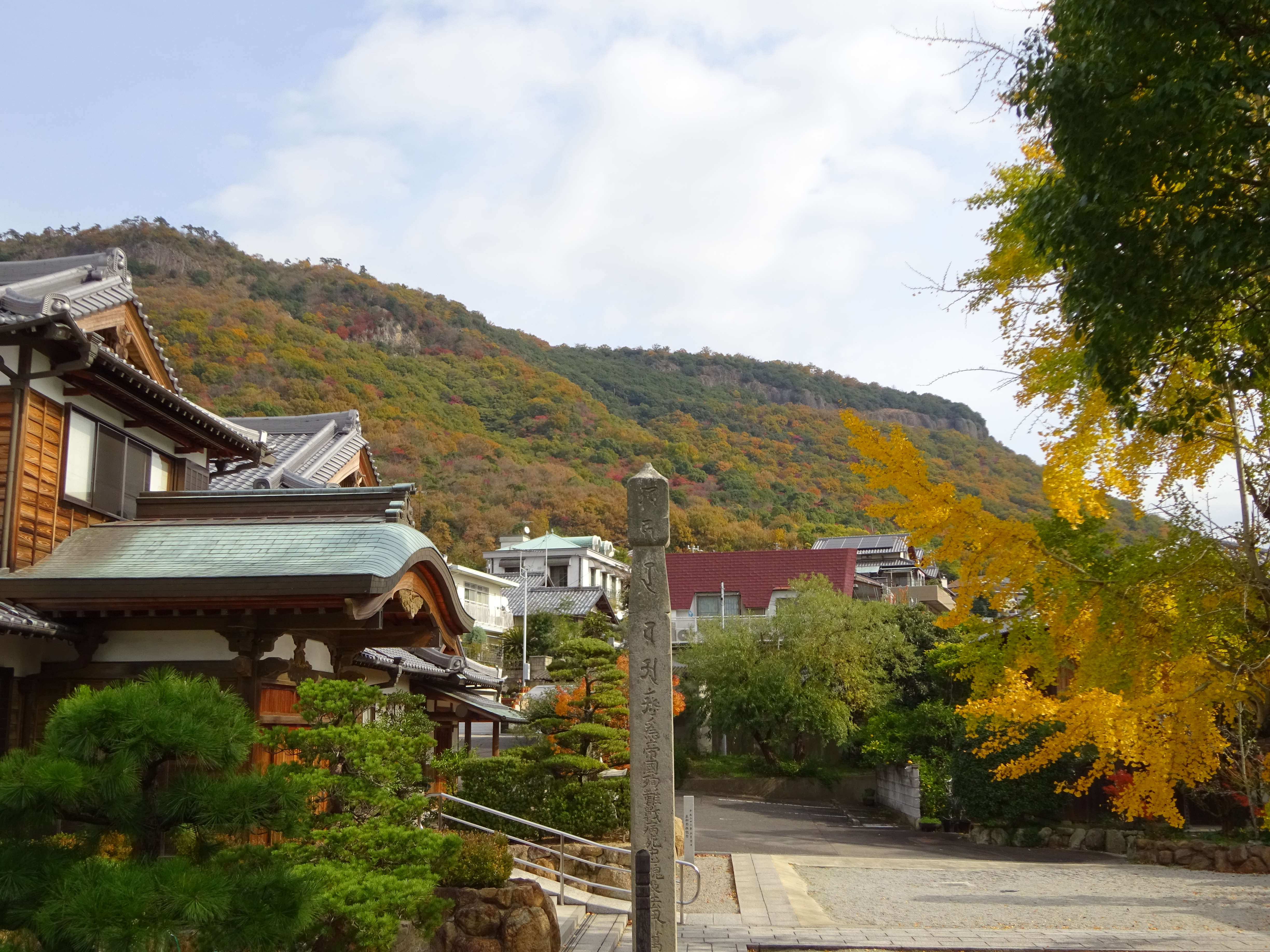 地蔵寺から屋島の南嶺の南端を望む